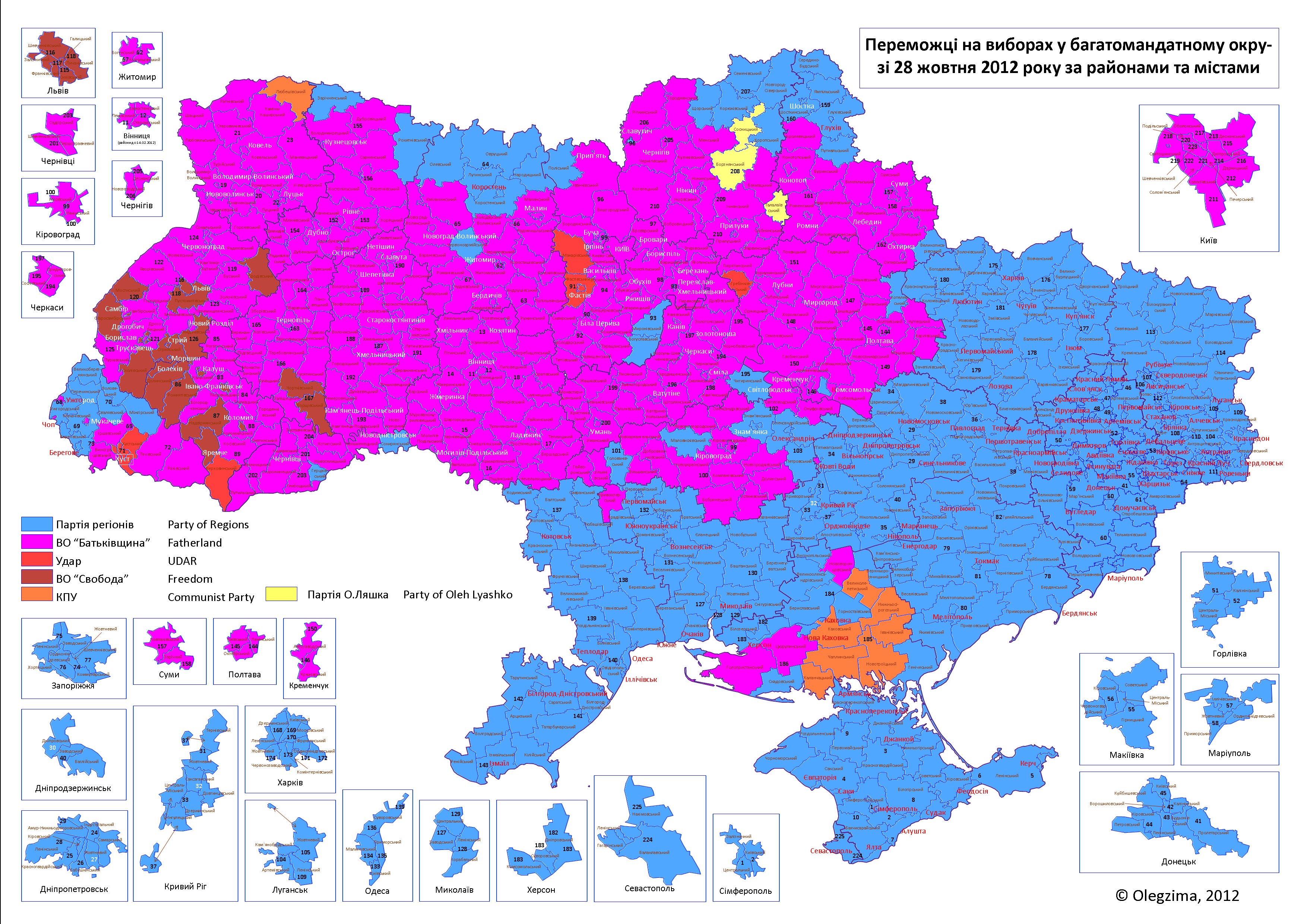 Победитель по многомандатному избирательному округу на выборах в Верховную Раду 28 октября 2012 года по районам и городам